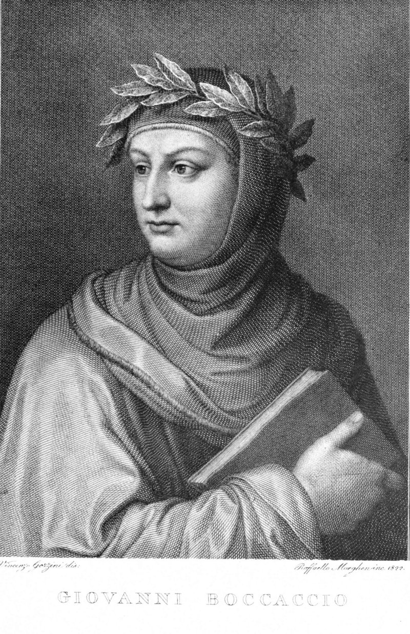 Portrait of Giovanni Boccaccio